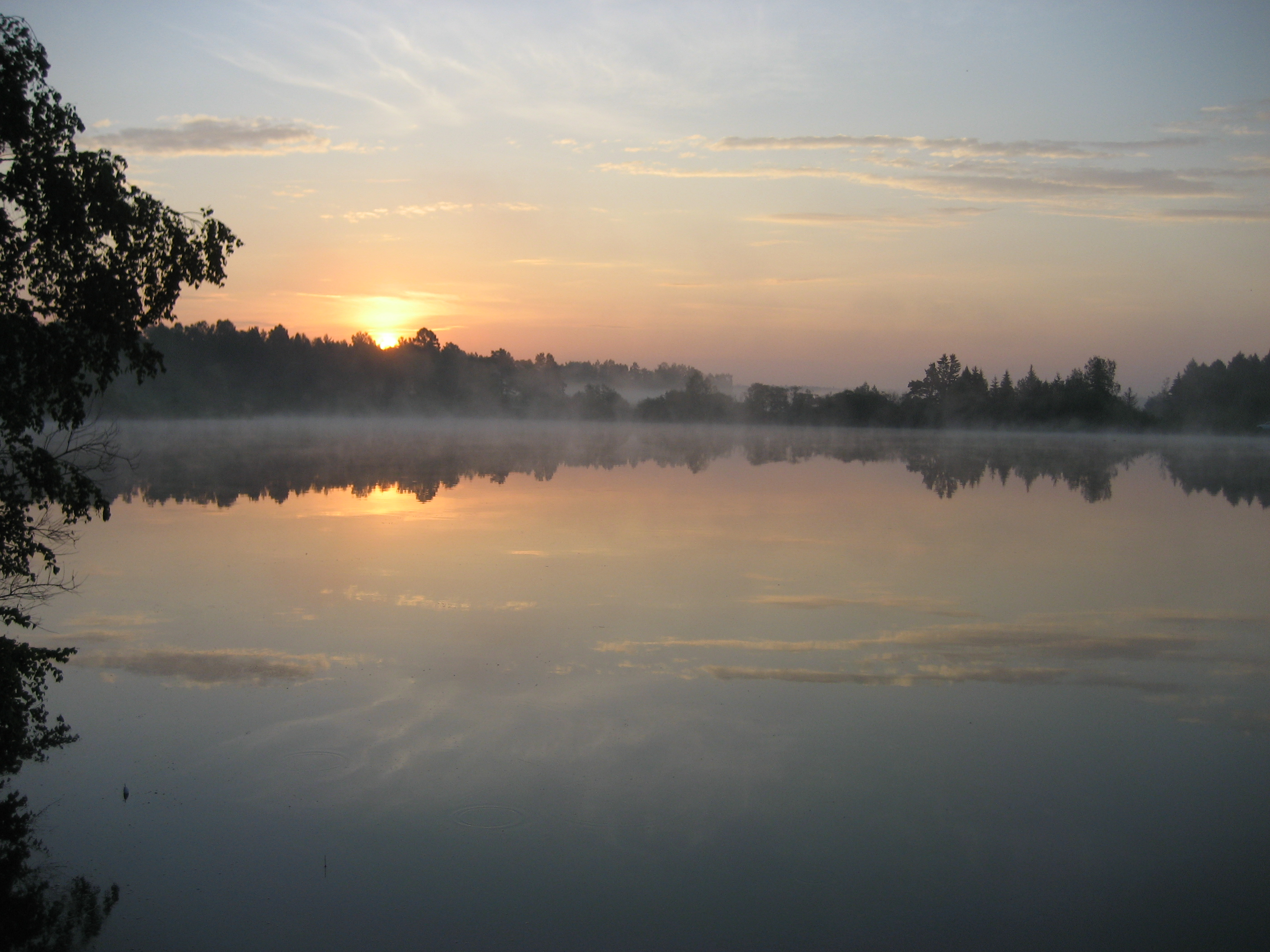 оссия, Красноярский Край, Большемуртинский Район, Хмелёво